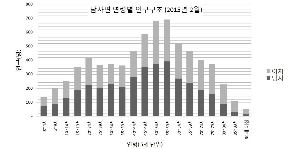 용인시 남사면 연령별 인구구조(2015년 2월 기준)